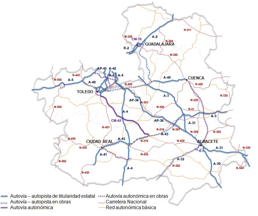 Mapa con la red de autovías, autopistas, carreteras nacionales y red principal de carreteras autonómicas de Castilla-La Mancha (2011).